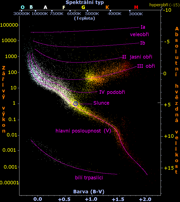 Hertzsprung-Russellův diagram. Graf zářivého výkonu a absolutní hvězdné velikosti podle barvy hvězd (horké, modrobílé hvězdy na levé straně a chladnější, rudé hvězdy na pravé straně).